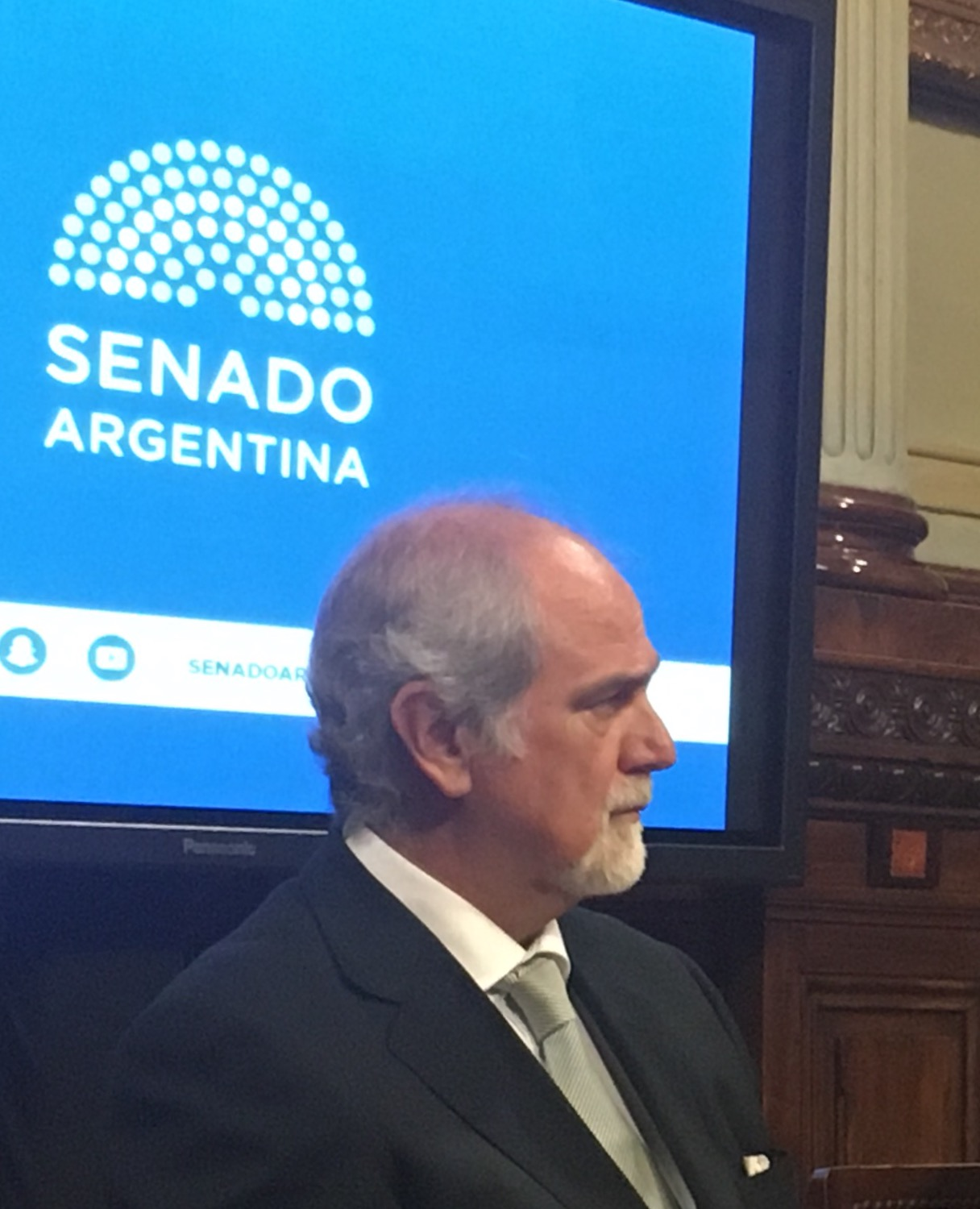 Marcos M. Córdoba